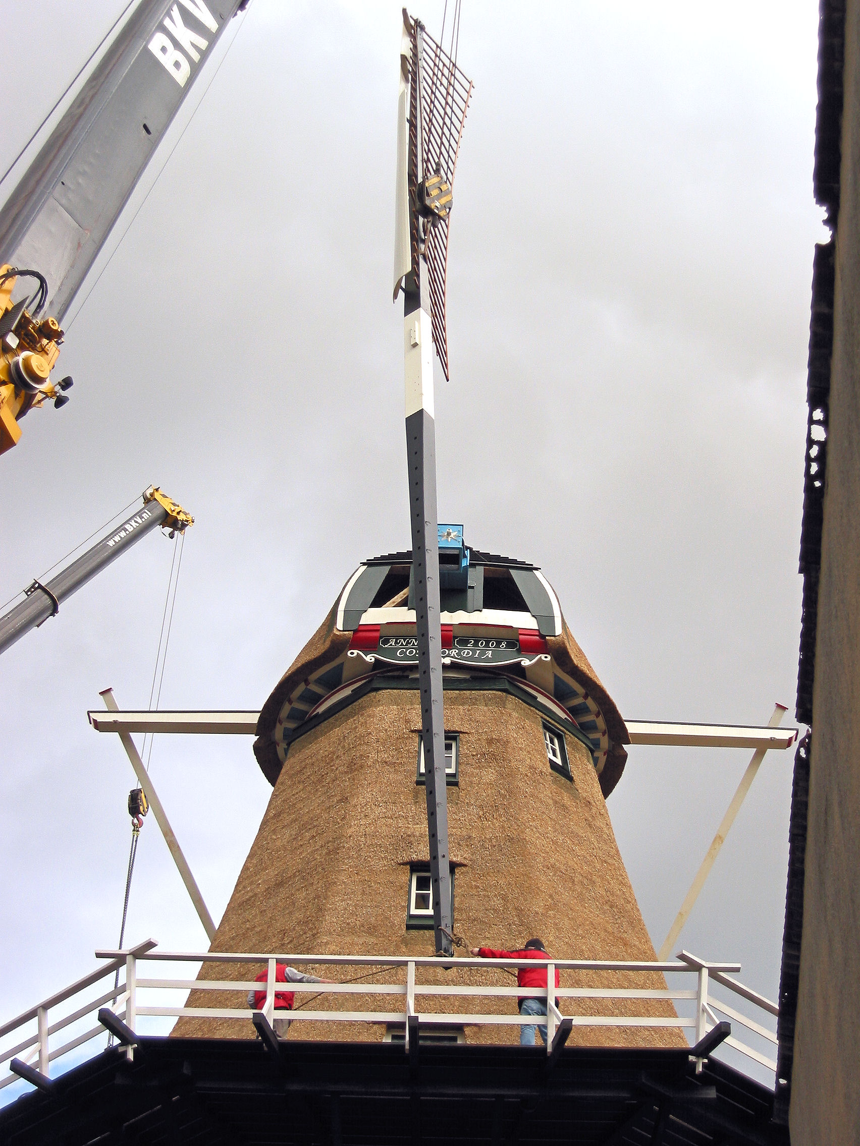 Roe steken van de Concordia molen te Ede